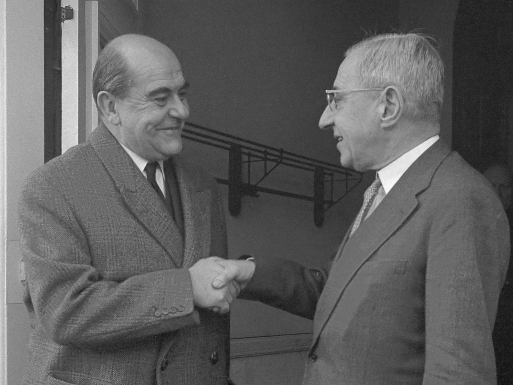 Voorzitter van de raadgevende vergadering van de Raad van Europa Per Federspiel bezoekt prof. De Quay 16 januari 1961